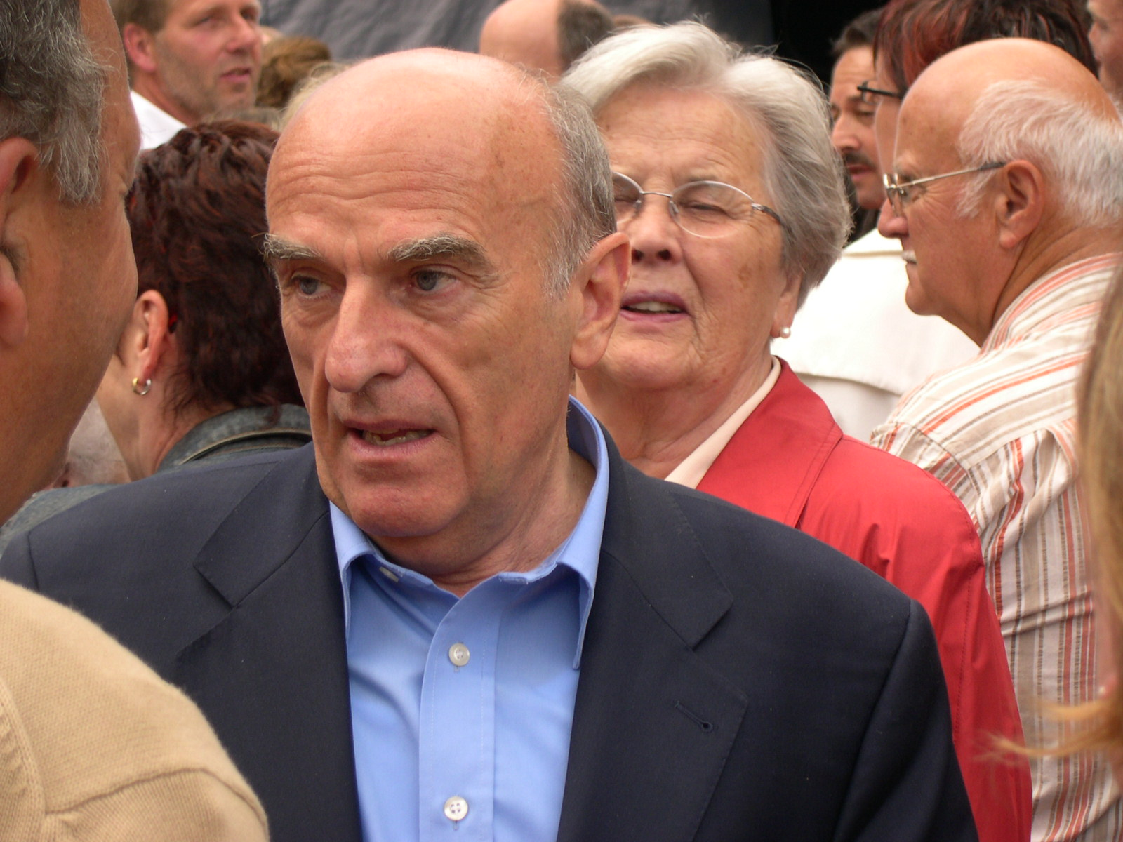 Hans-Rudolf Merz in Langnau im Emmental. Aufgenommen von Paenultima am 1. Juli 2005, 17:38